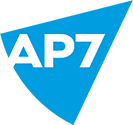 Sjunde AP-fondens logotyp.